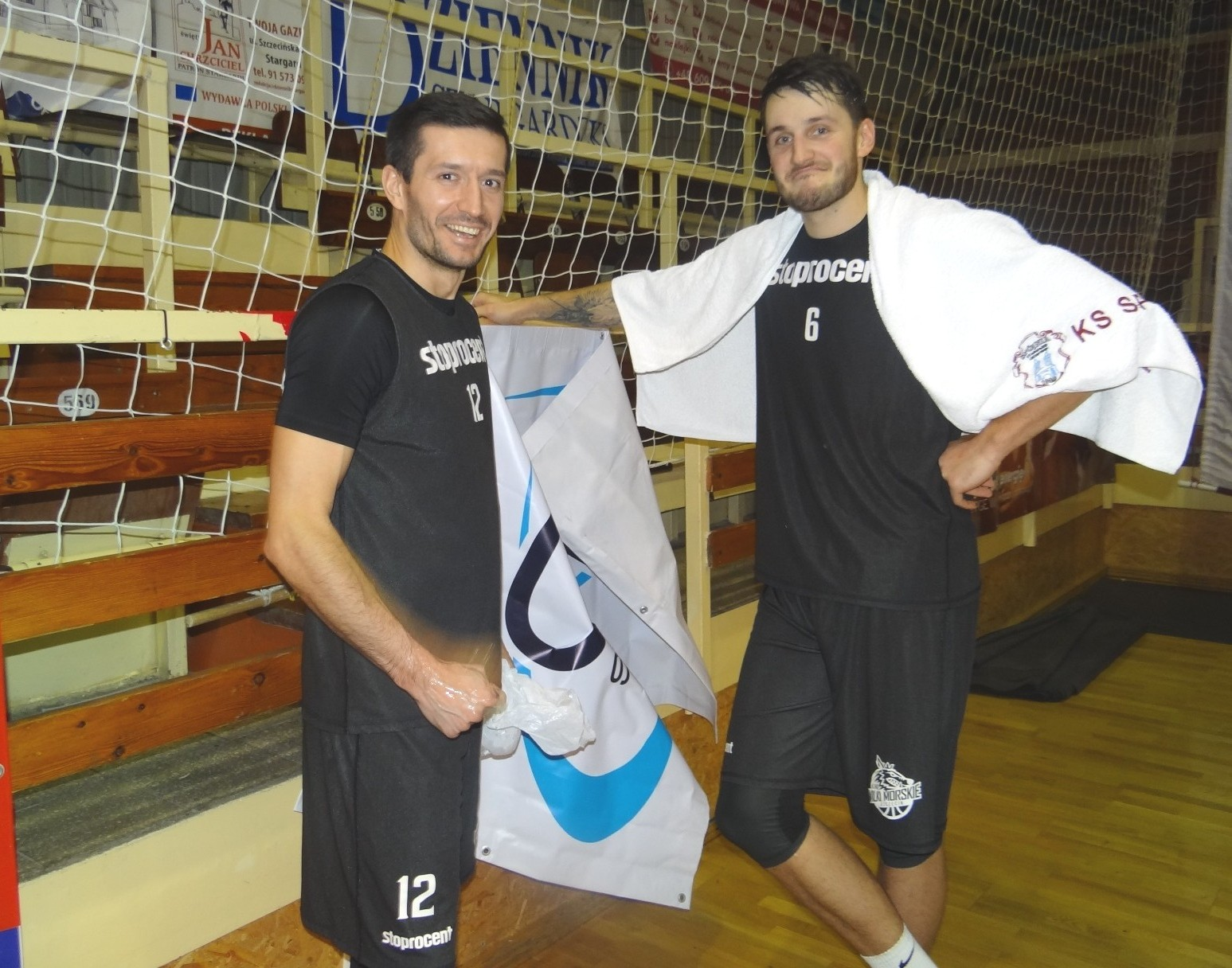 Majcherek, Jogela (01.12.2018)